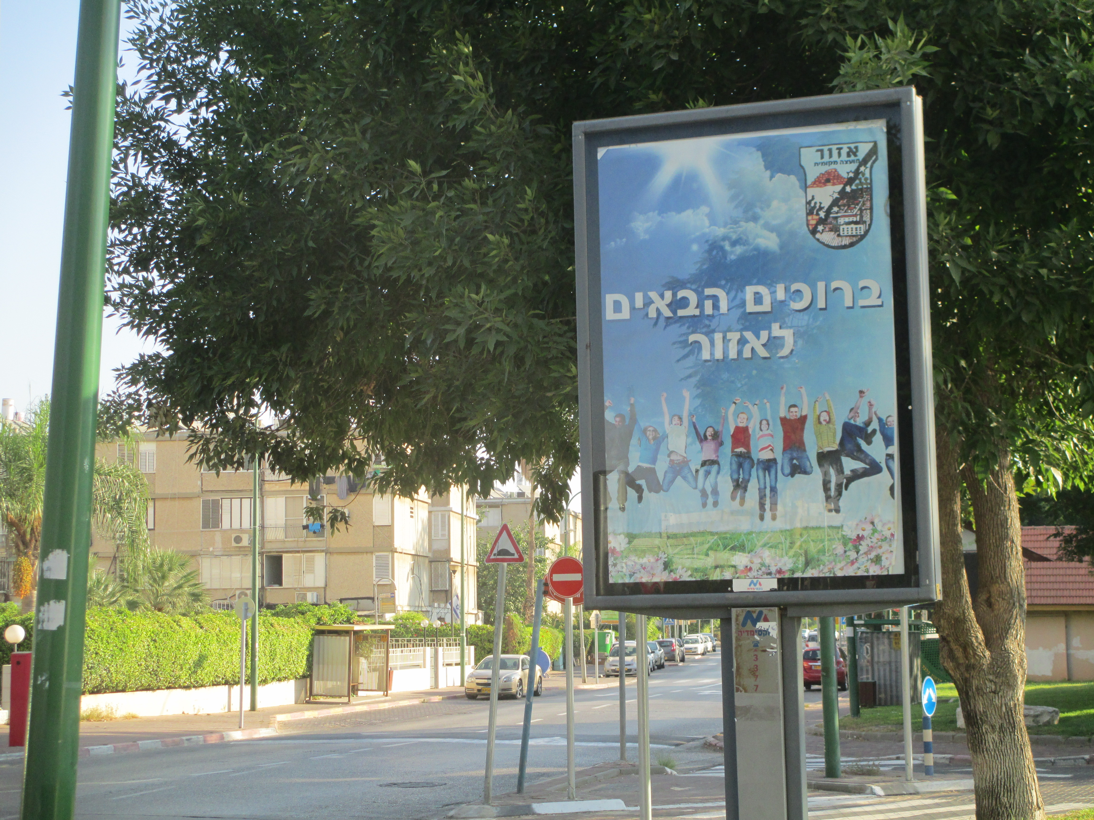 אחת הכניסות לאזור